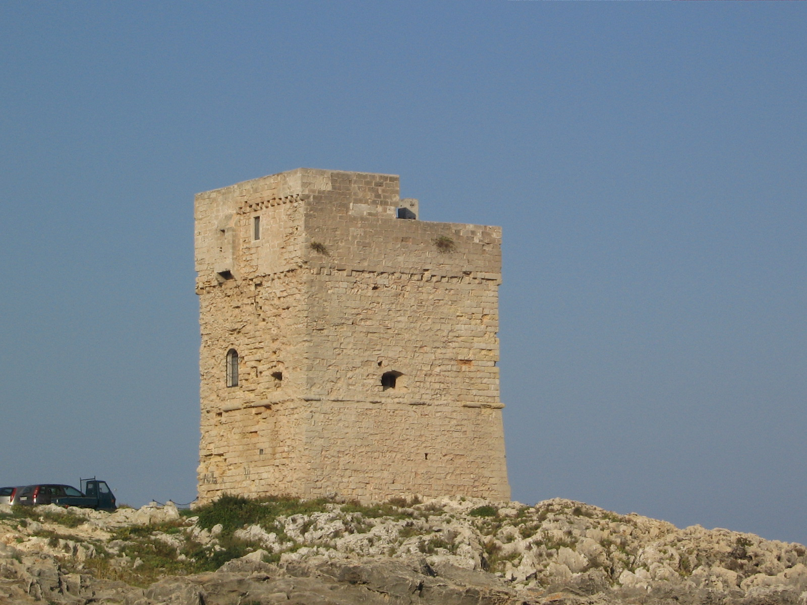 Marina Serra, frazione di Tricase: la Torre Palane.